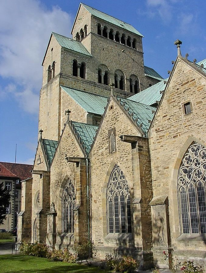 Dom zu Hildesheim mit seinen südlichen Seitenkapellen. Kapelle der heiligen Elisabeth auf dem Foto rechts, links daneben die Kapelle der Märtyrer Vinzenz und Anastasius. Beide gotische Kapellen waren Stiftungen des Domherrn Gunzelin d. Ä. von Berwinkel. Die ursprünglichen Kapellen von 1320 und 1323 wurden 1841–50 abgerissen und durch Neubauten ersetzt. Zerstörung im Zweiten Weltkrieg; Wiederaufbau 1950–60 und umfangreiche Domsanierung 2010–14.